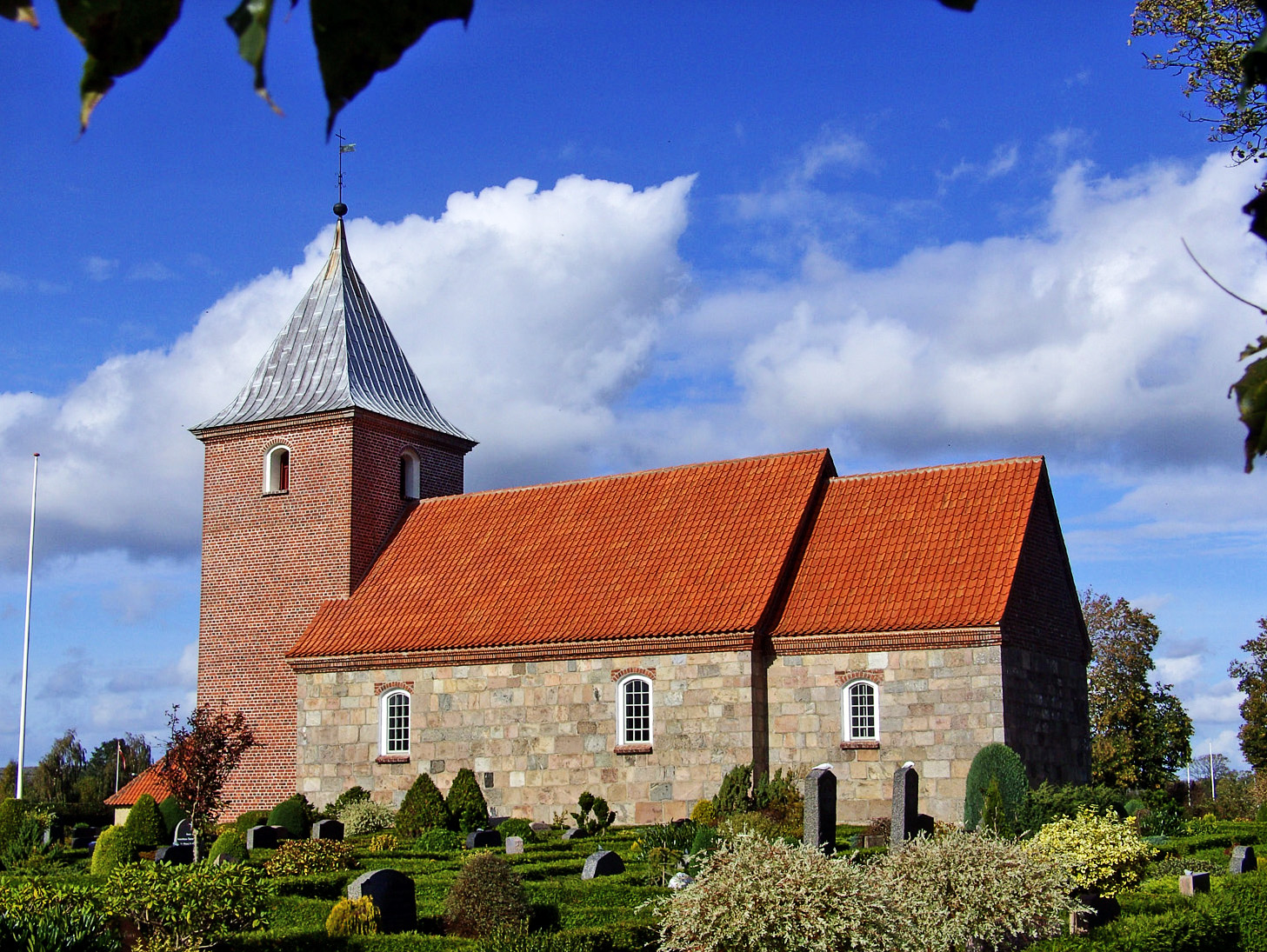 fra sydøst